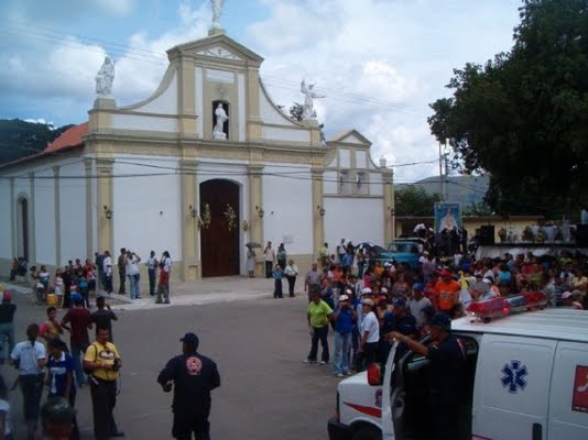 vista del santuario en salom